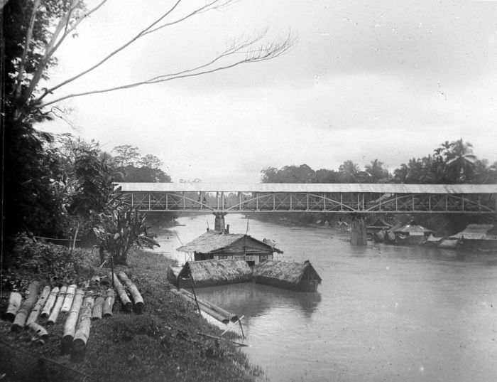 Negatief. Een houten brug over de Lematang-rivier te Moearaenim in de residentie Palembang, zuid-Sumatra